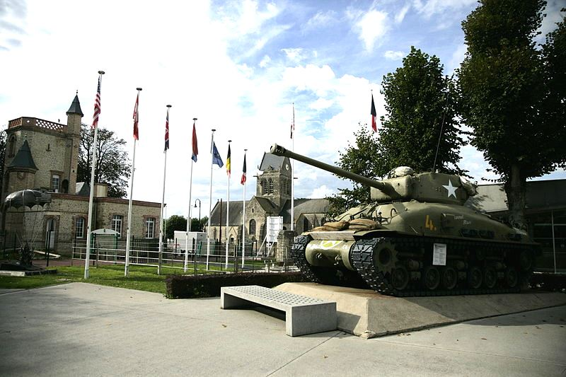 L'Airborne Museum se situe en face de l'église de Sainte-Mère-Eglise